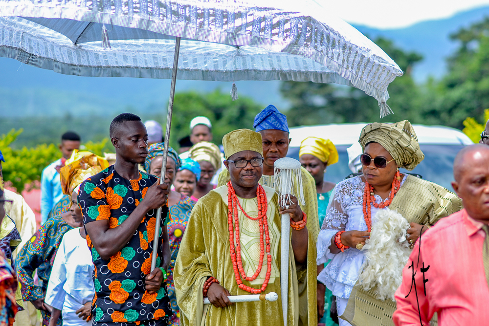 Ipetu Ijesha King